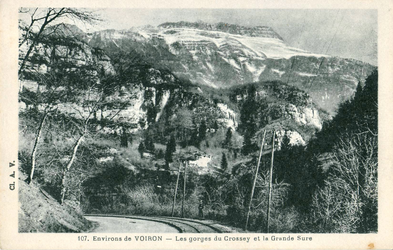 Carte postale ancienne éditée par Cl. A. V., n°107 : Environs de VOIRON - Les Gorges du Crossey et la Grande Sure